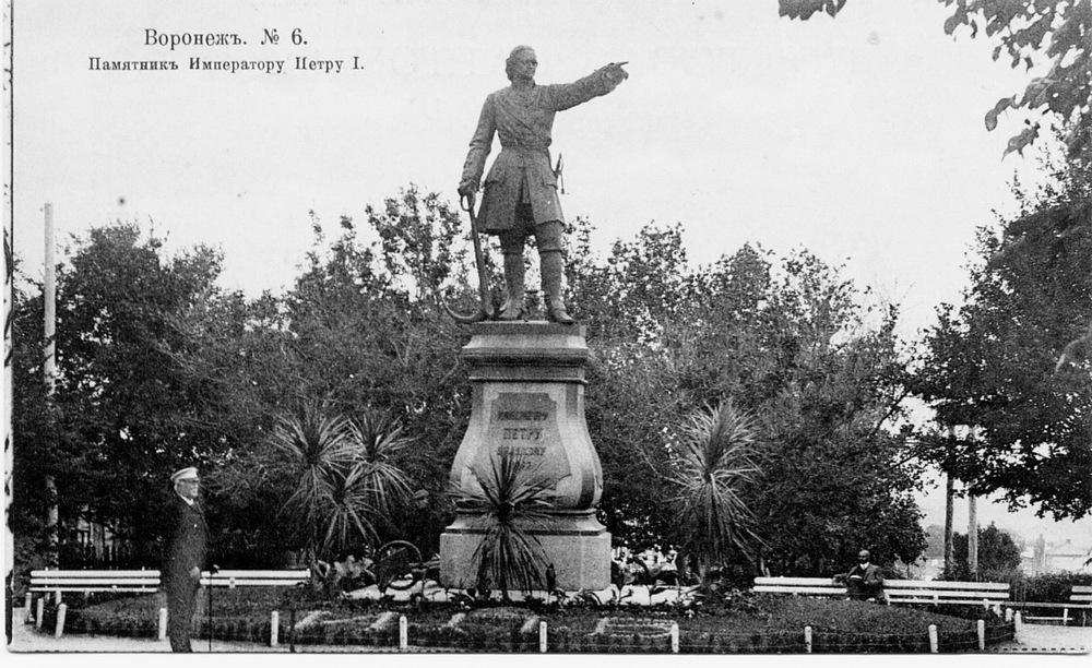 Памятник Императору Петру I